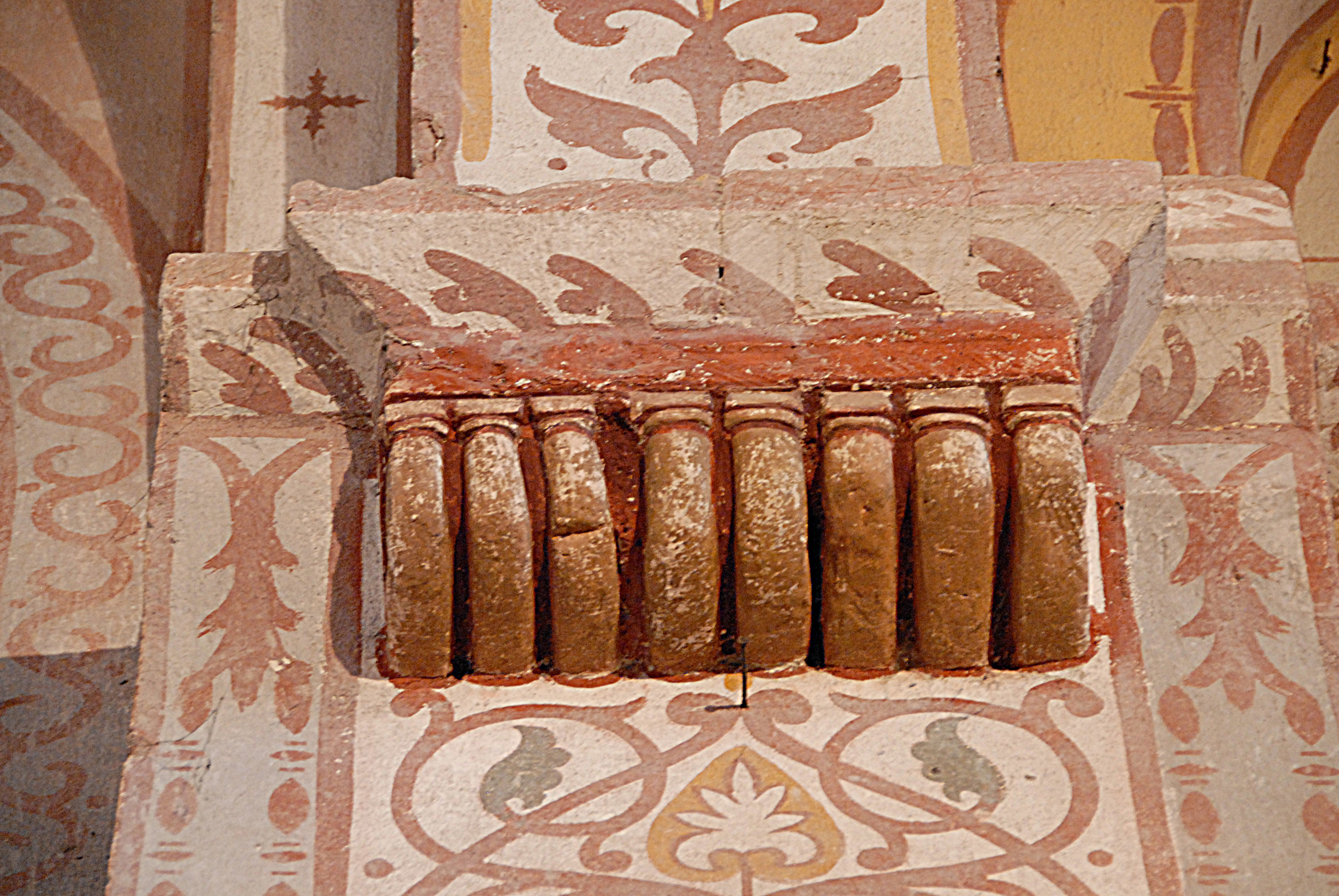 Civaux, Kirche, Kapitell, rätselhafte Röhren (?)